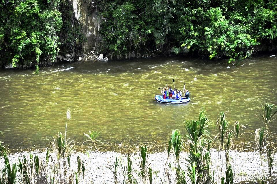 Realizado en el río Satipo